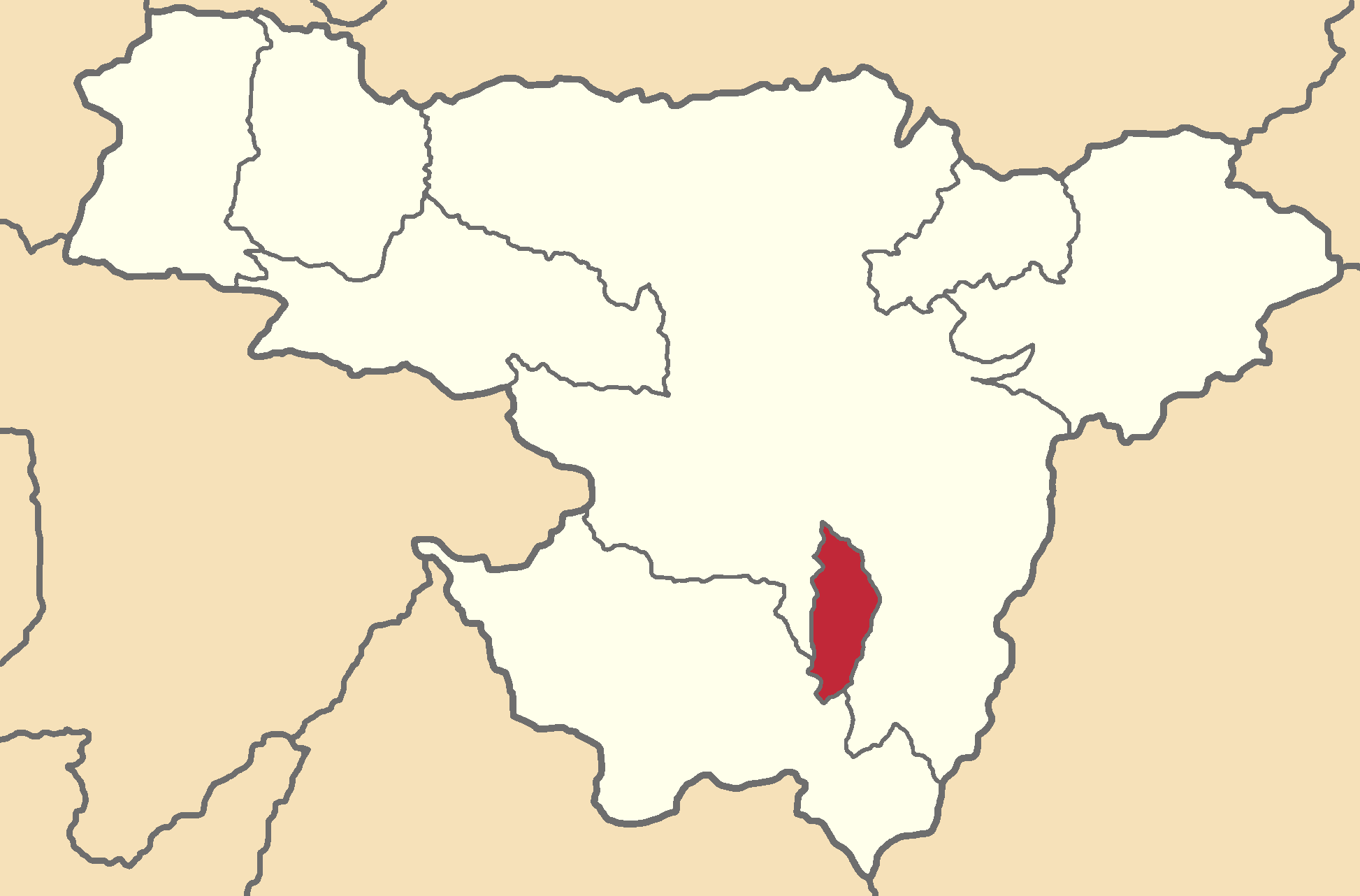 Mapa localizador del cantón en Pichincha, Ecuador